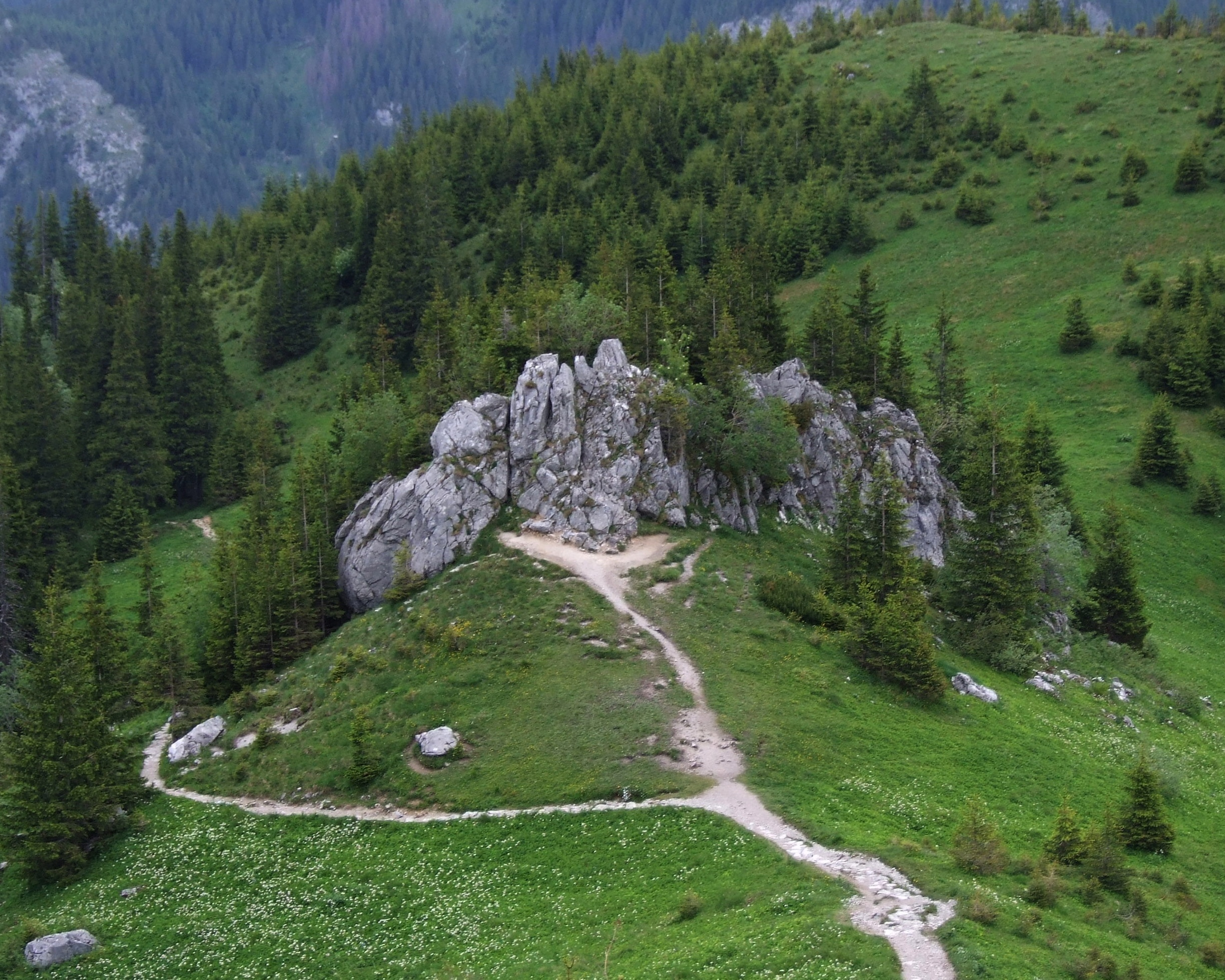 Siodło za Piecem, Piec i Upłaziańska Kopka